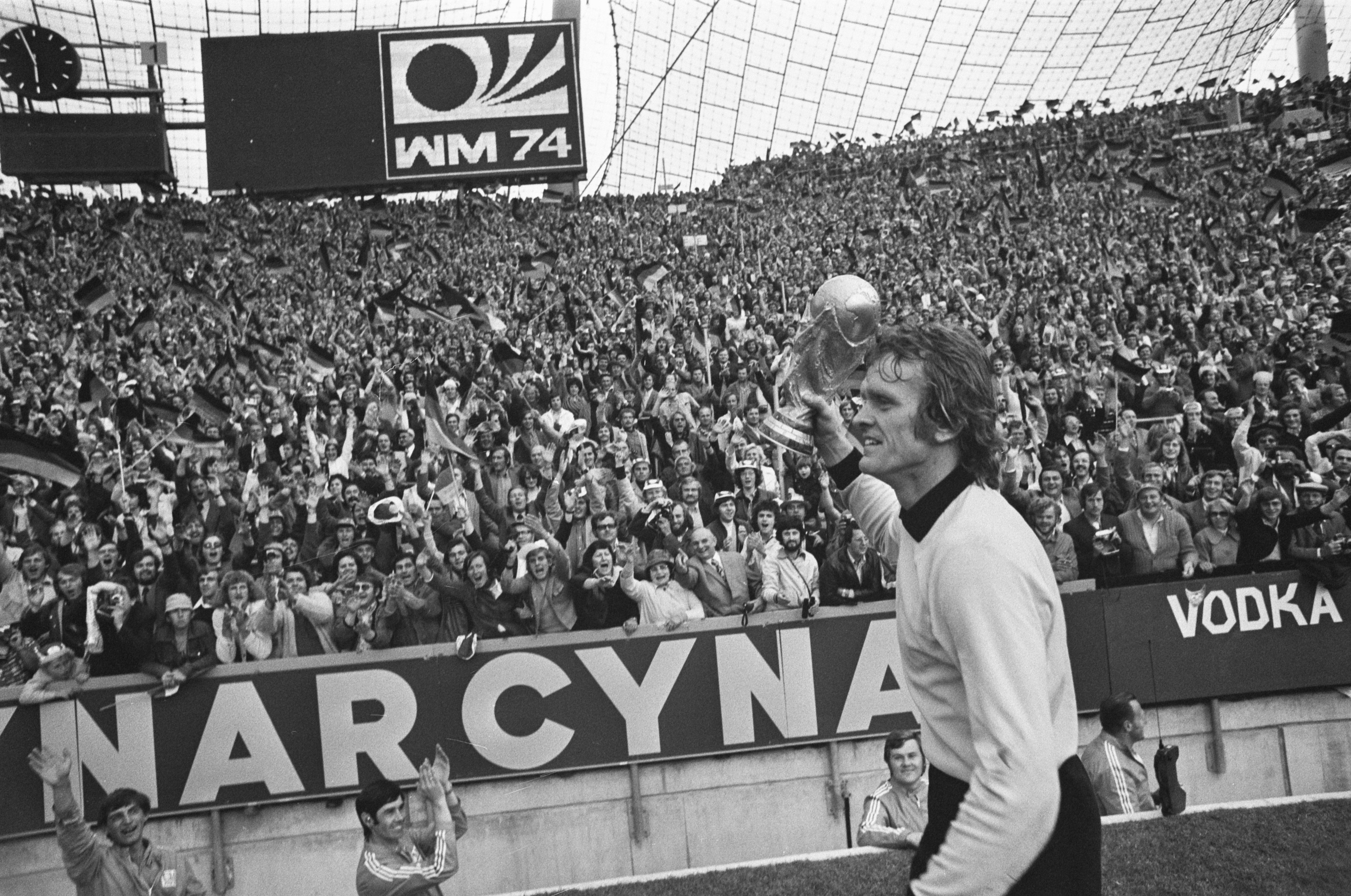 Collectie / Archief : Fotocollectie Anefo Reportage / Serie : [ onbekend ] Beschrijving : Finale wereldkampioenschap voetbal 1974 in Munchen, West Duitsland tegen Nederland 2-1; Sepp Maier met wereldbeker langs publiek Datum : 7 juli 1974 Locatie : München, Nederland, West-Duitsland Trefwoorden : finales, publiek, sport, voetbal, wereldkampioenschappen Persoonsnaam : Maier, Sepp Fotograaf : Verhoeff, Bert / Anefo Auteursrechthebbende : Nationaal Archief Materiaalsoort : Negatief (zwart/wit) Nummer archiefinventaris : bekijk toegang 2.24.01.05 Bestanddeelnummer : 927-3079